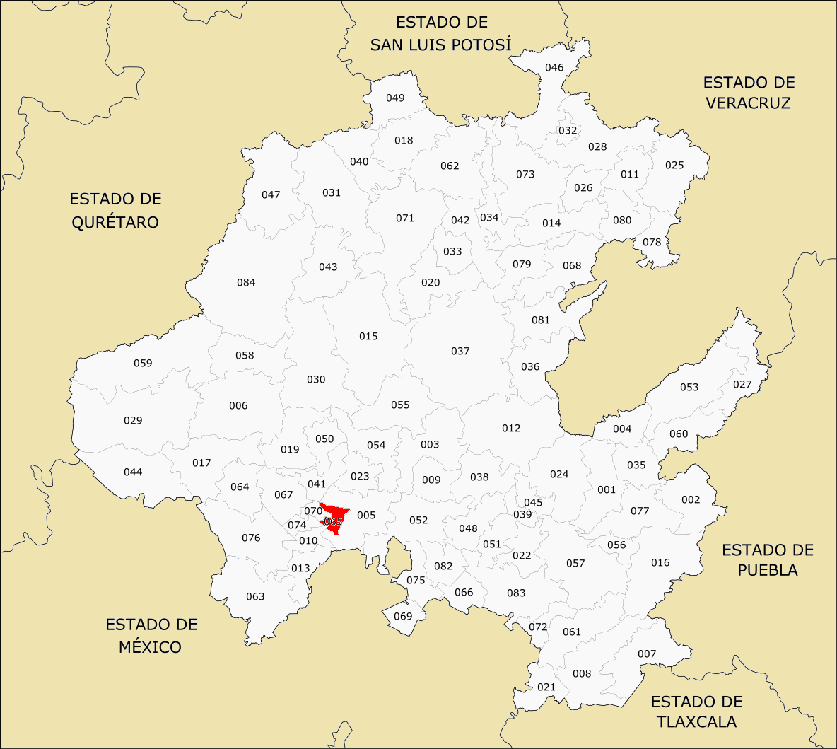 Municipios de Hidalgo